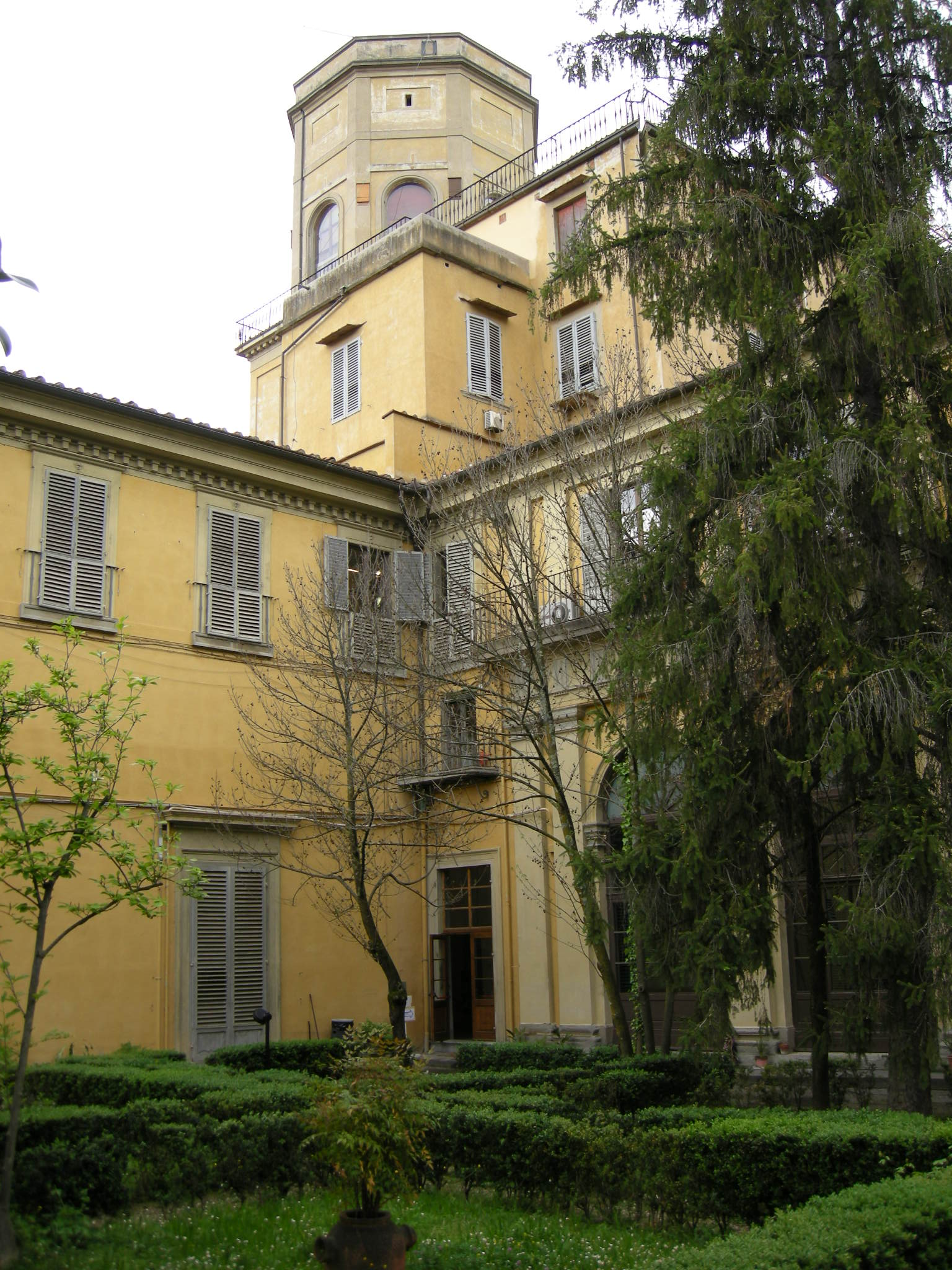 Palazzo torrigiani specola, giardino